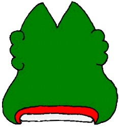 Glifo de nicolas flores, Hidalgo